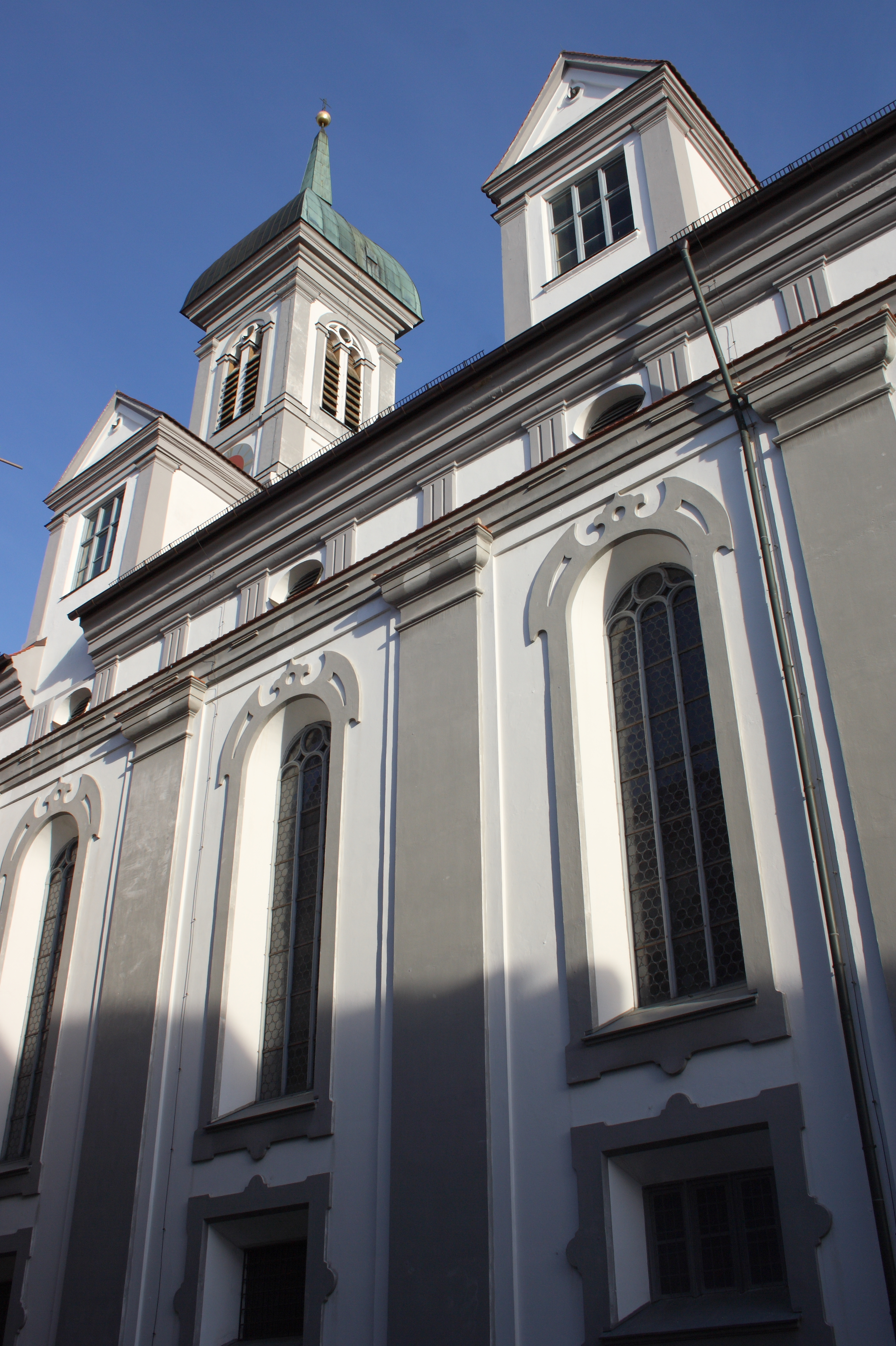 Studienkirche Mariä Himmelfahrt in Dillingen an der Donau (Bayern)